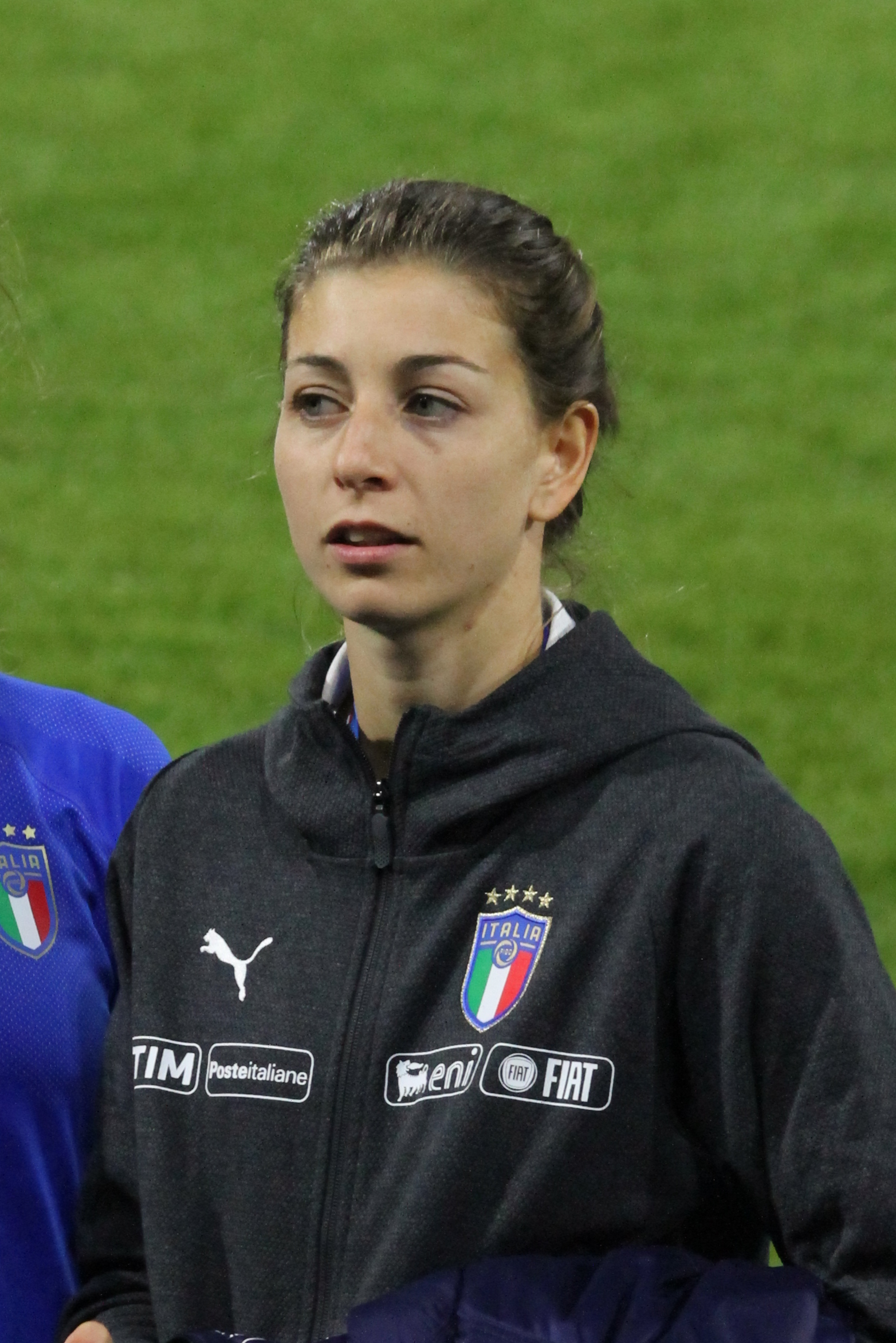 Ferrara, 10 aprile 2018: Italia vs Belgio, qualificazioni al Mondiale di Francia 2019, scatti a fine incontro. Greta Adami.